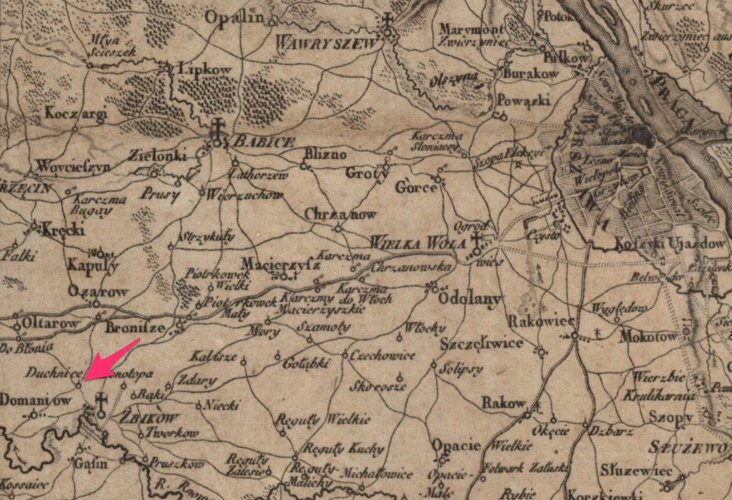 Fragment mapy okolic Warszawy w diametrze pięciu mil z zaznaczonymi Duchnicami